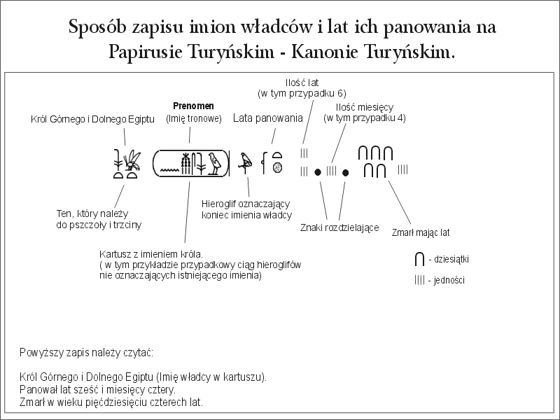 Sposób zapisu imion i czasu panowania władców Starożytnego Egiptu, na Papirusie Turyńskim - Kanonie Turyńskim.